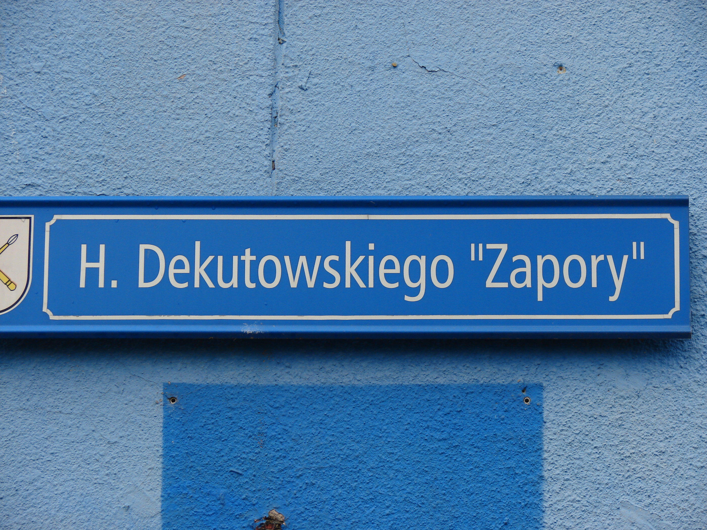 Ulica Hieronima Dekutowskiego "Zapory" w Kraśniku